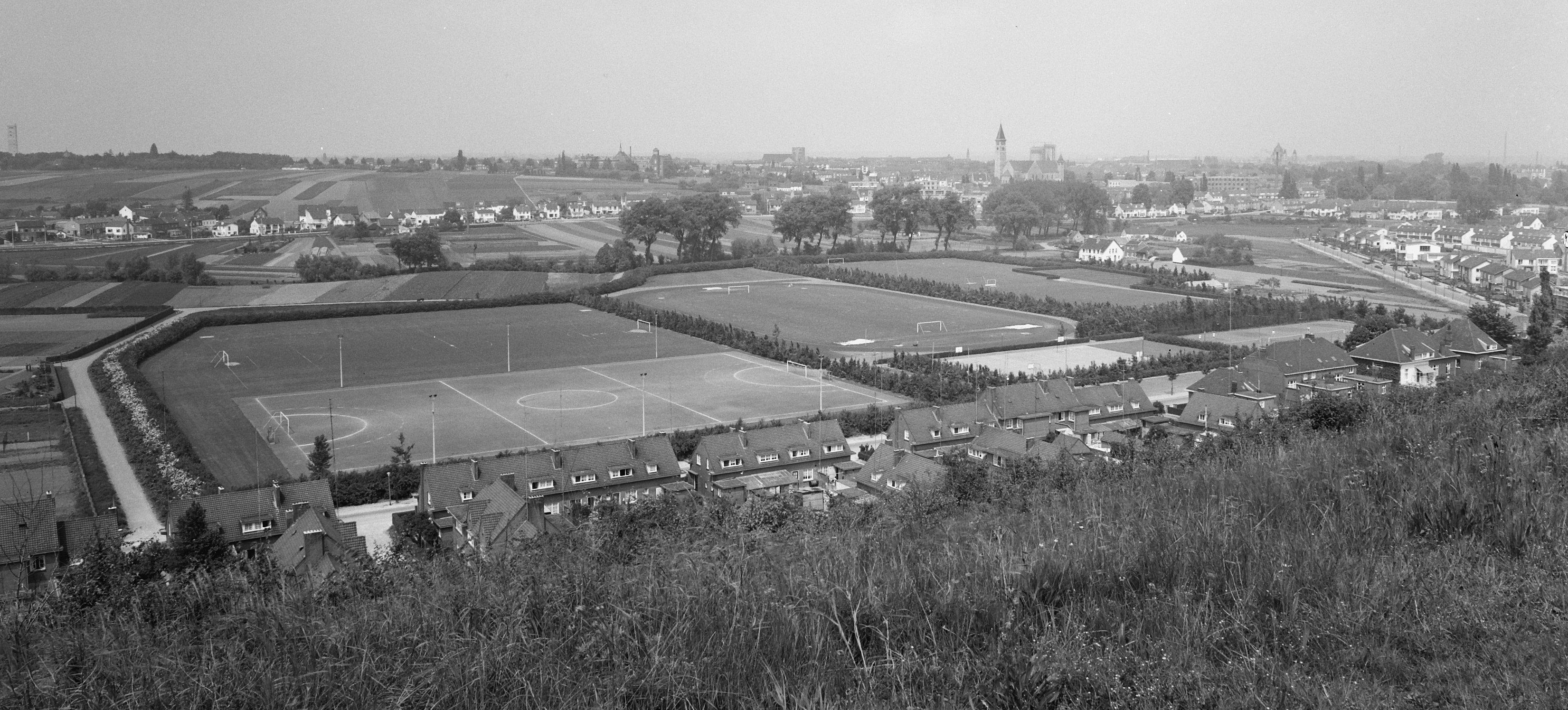 Collectie / Archief : Fotocollectie Nederlandse Heidemaatschappij Reportage / Serie : [ onbekend ] Beschrijving : Opname vanaf de Sint Pietersberg te Maastricht in NW richting. Uitzicht over het Jekerdal op de wijk Biesland. Kilometervak 175-316. Datum : mei 1961 Locatie : Jekerdal, Maastricht, Sint Pietersberg Trefwoorden : recreatieterreinen, sportveldencomplexen, vliegvelden e.d. Fotograaf : [onbekend] Auteursrechthebbende : Nationaal Archief Materiaalsoort : Negatief (zwart/wit) Nummer archiefinventaris : bekijk toegang 2.24.06.02 Bestanddeelnummer : 163-0960